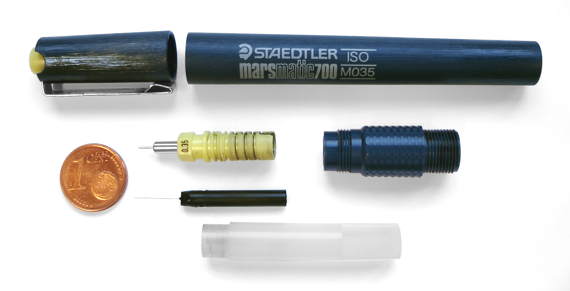 Tuschefüller von Staedler um 1985, Marsmatic700, Strichstärke 0,35mm, zur Reinigung demontiert. Dieses Schreibgerät war nachfüllbar und hatte keine auswechselbare Tuschepatrone.